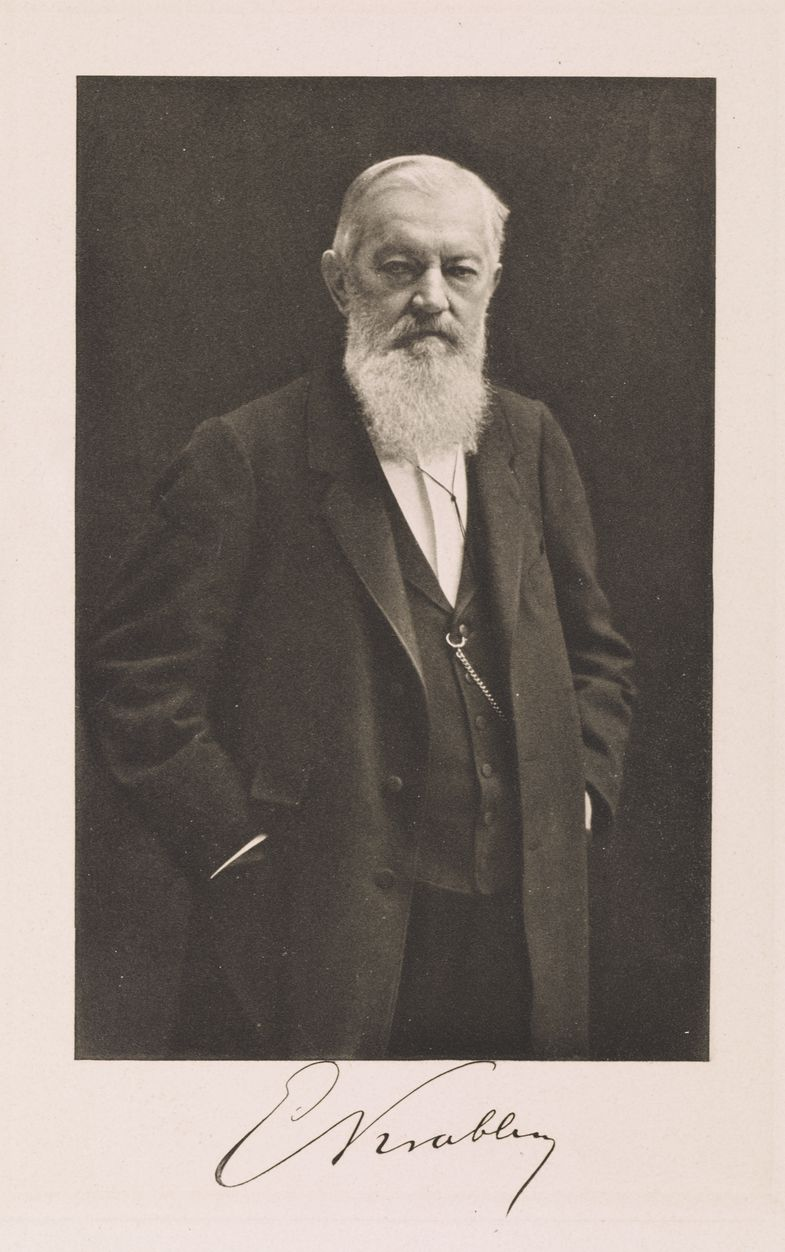 Emil Krabler, 1857-1907, Montaningenieur im Ruhrgebiet.